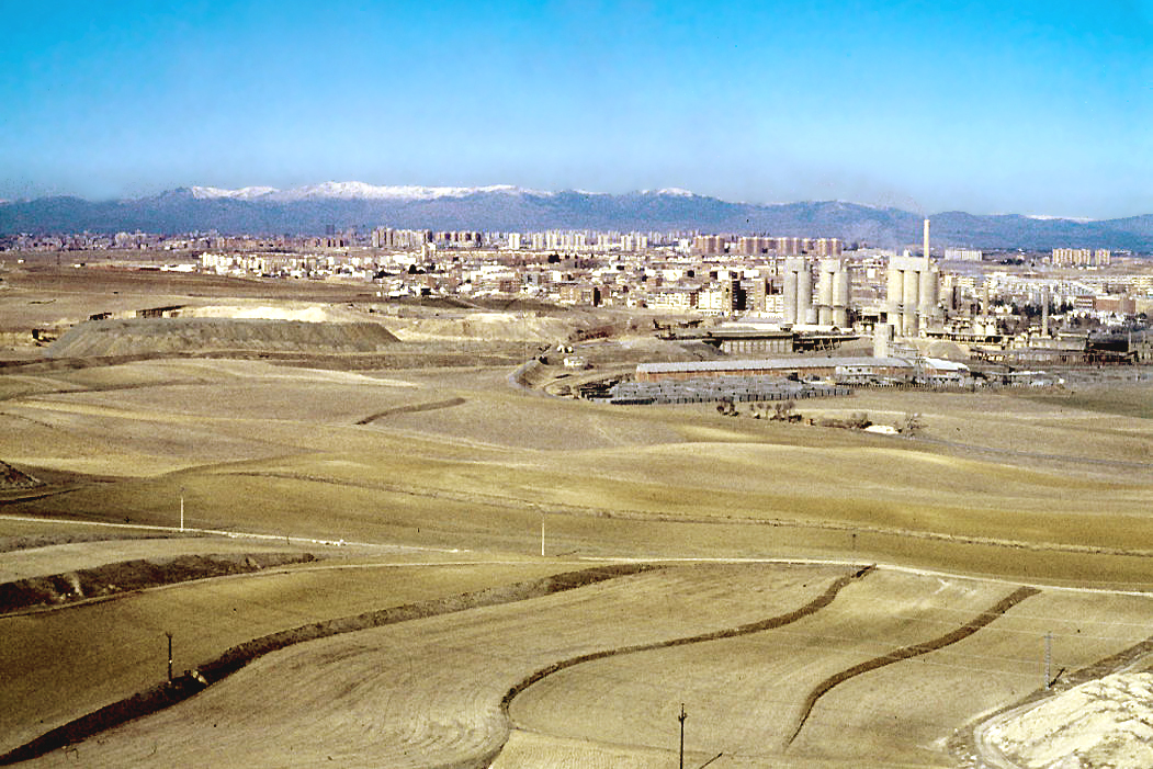 Vista desde el Cerro Almodóvar hacia el norte: casco histórico de Vicálvaro, con la fábrica de cemento y La Dehesa sin urbanizar; al fondo, la Sierra de Guadarrama. Vicálvaro (Madrid, España)